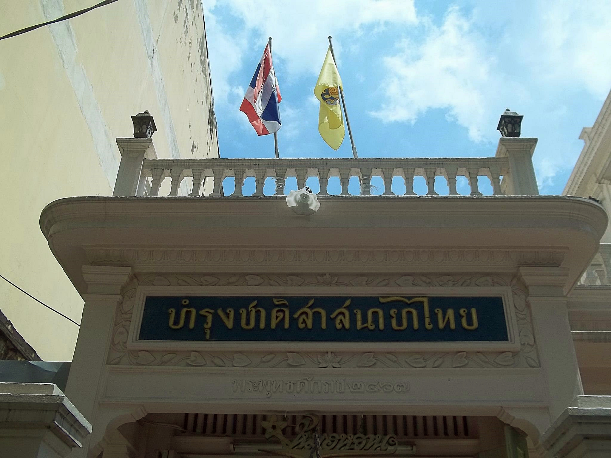 ร้านหมอหวาน ในซอยเทศา ถนนบำรุงเมือง